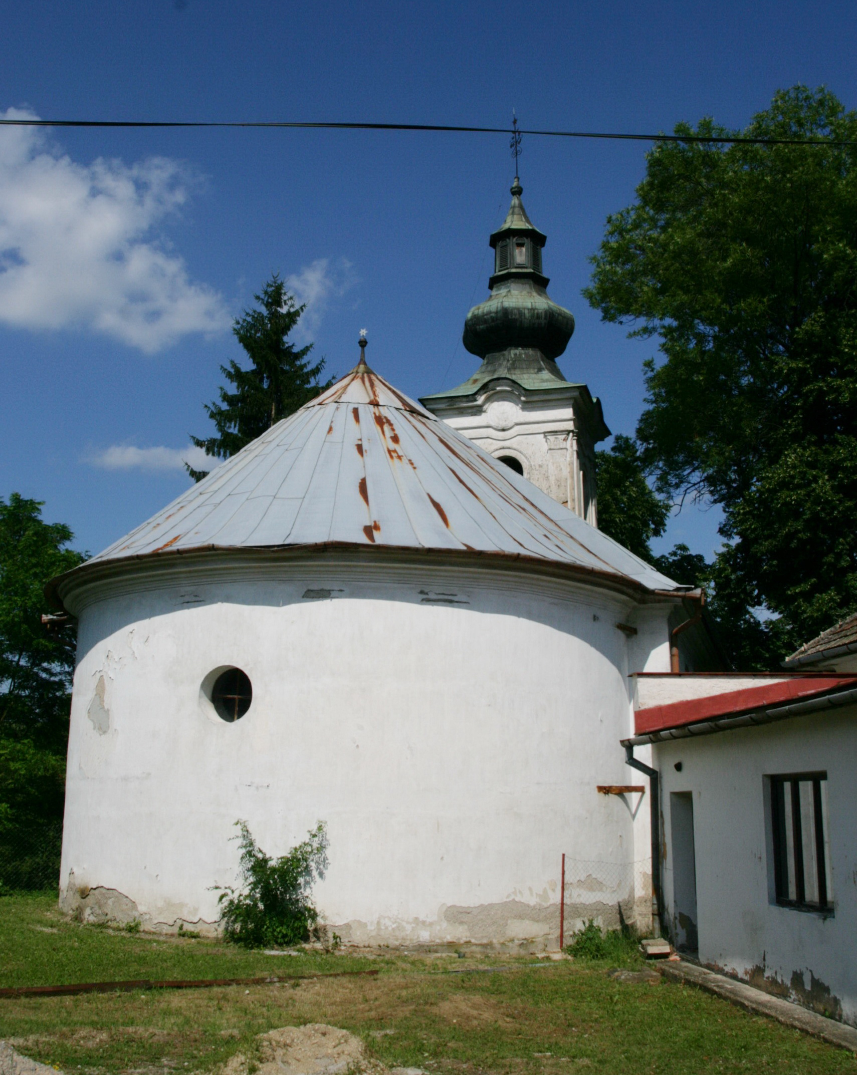 Perjése - evangélikus templom This medium shows the protected monument with the number 609-940/0 in the Slovak Republic.